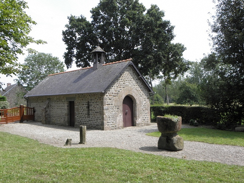 Chapelle de Ballant à Vessey (50).